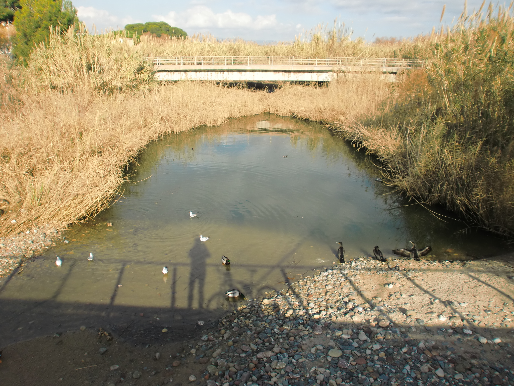 La Desembocadura de la riera de Maspujols